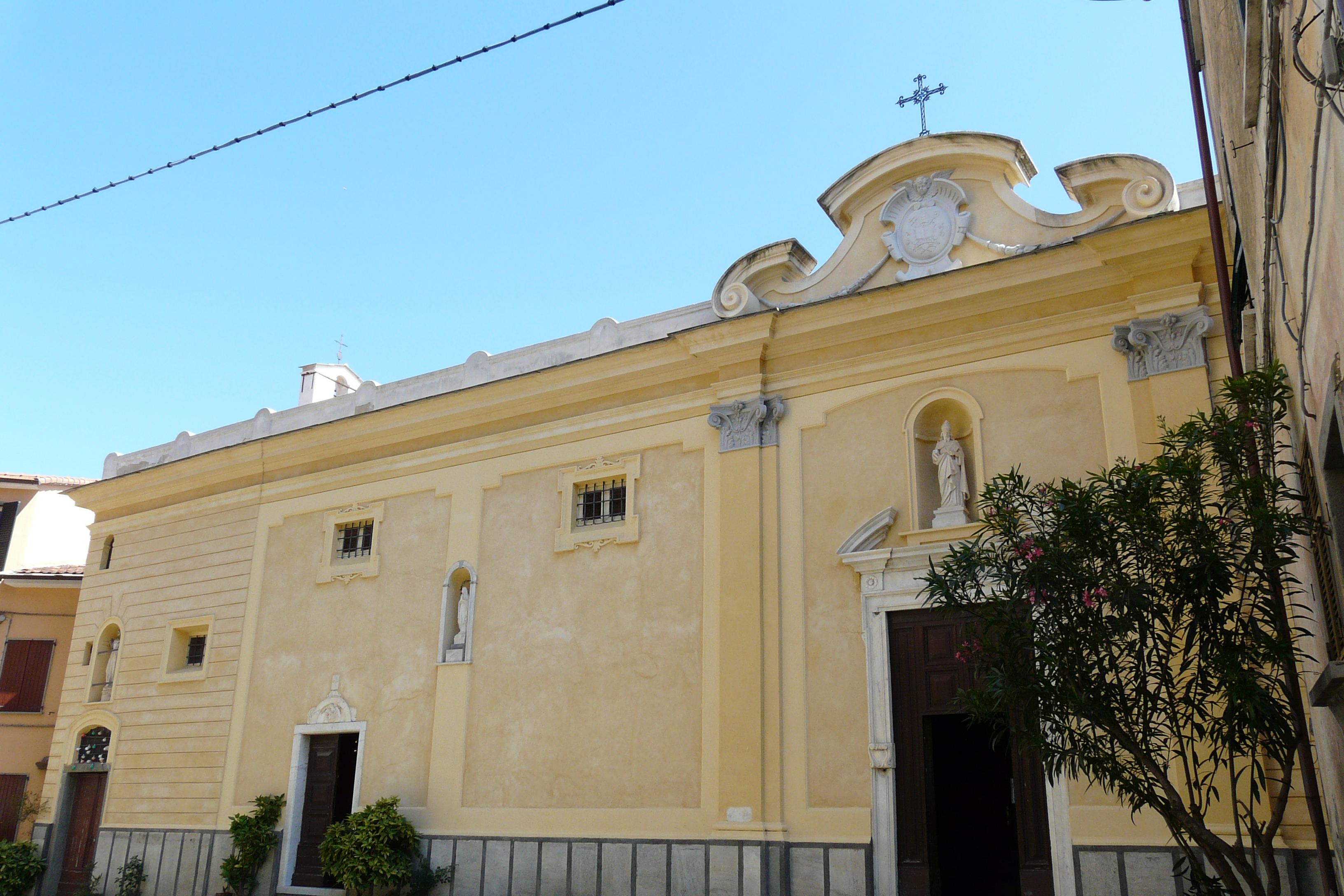 Chiesa di San Nicolò di Arcola, Liguria, Italia